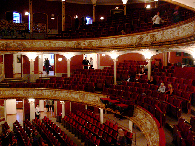 Wien, Volkstheater, Zuschauerraum